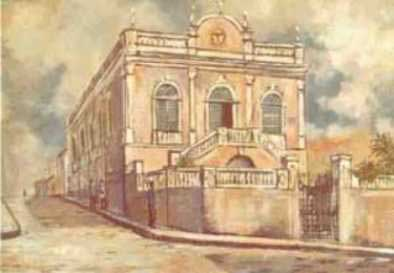 Antiga sede do TJSC na Rua Jerônimo Coelho, Florianópolis / SC